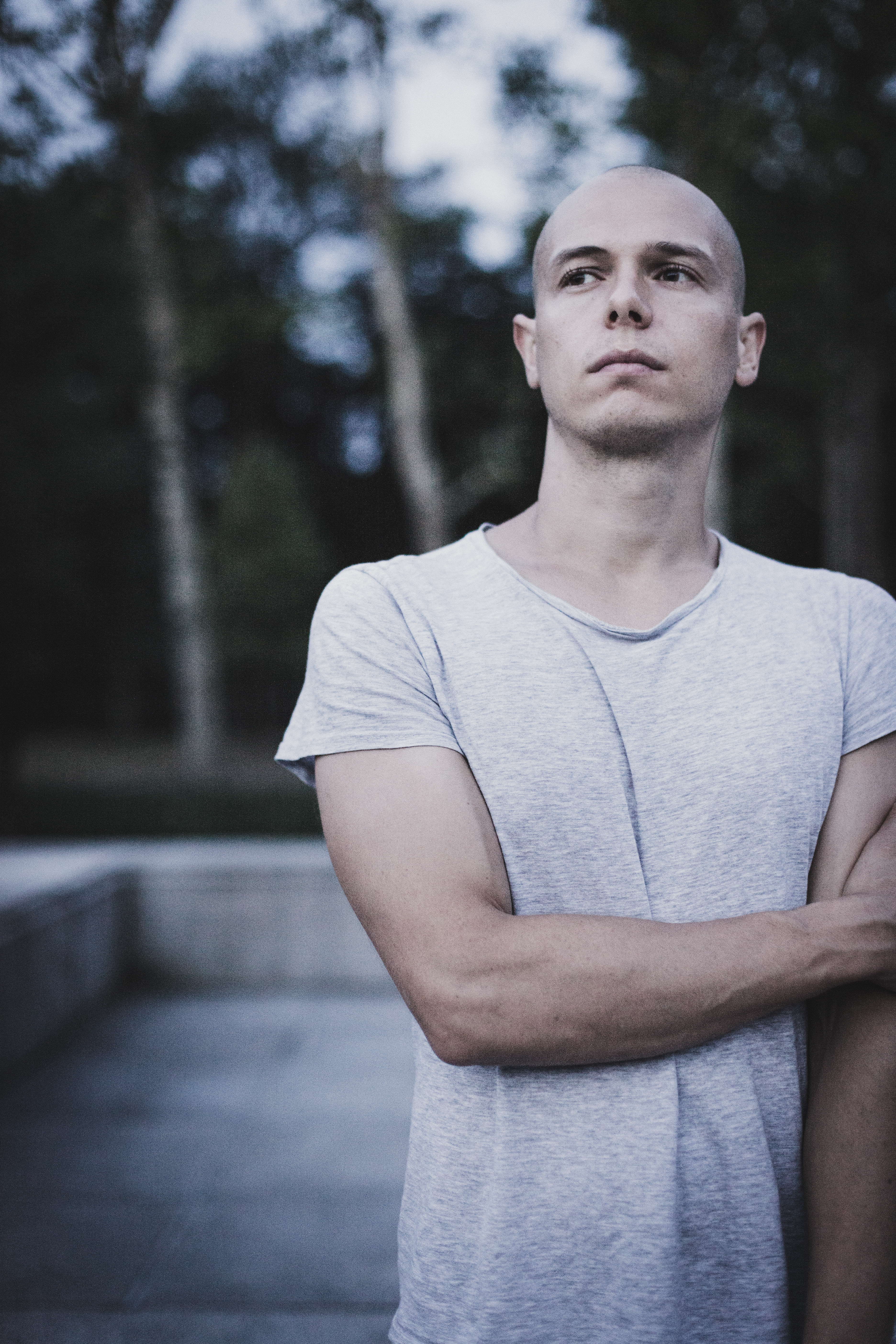 Recondite [im Jahr 2013]